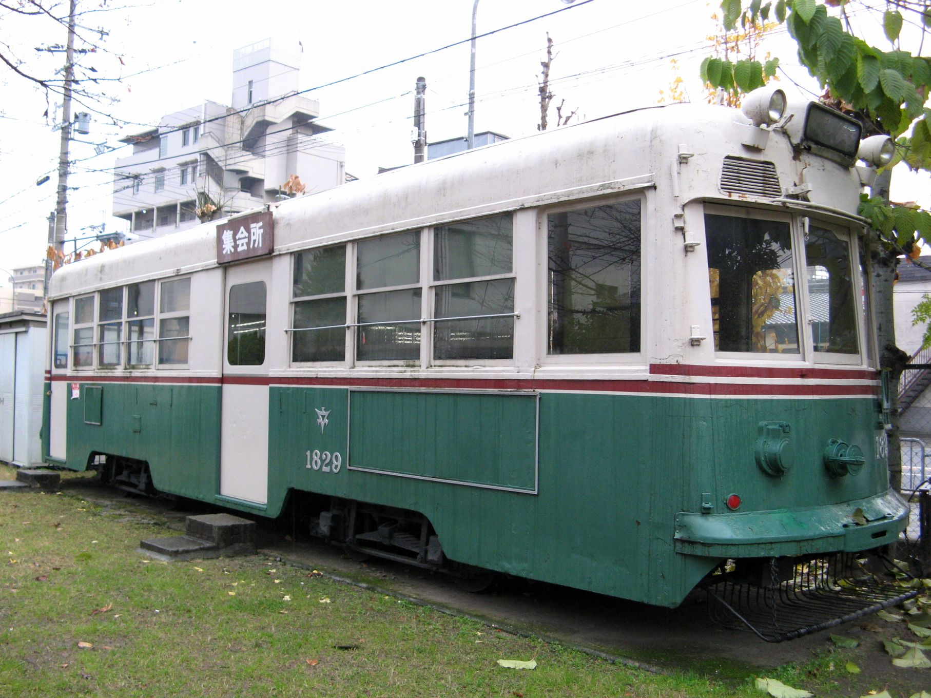 近鉄伏見駅前の柴田屋敷町公園で集会所として保存されている京都市電1800形1829号